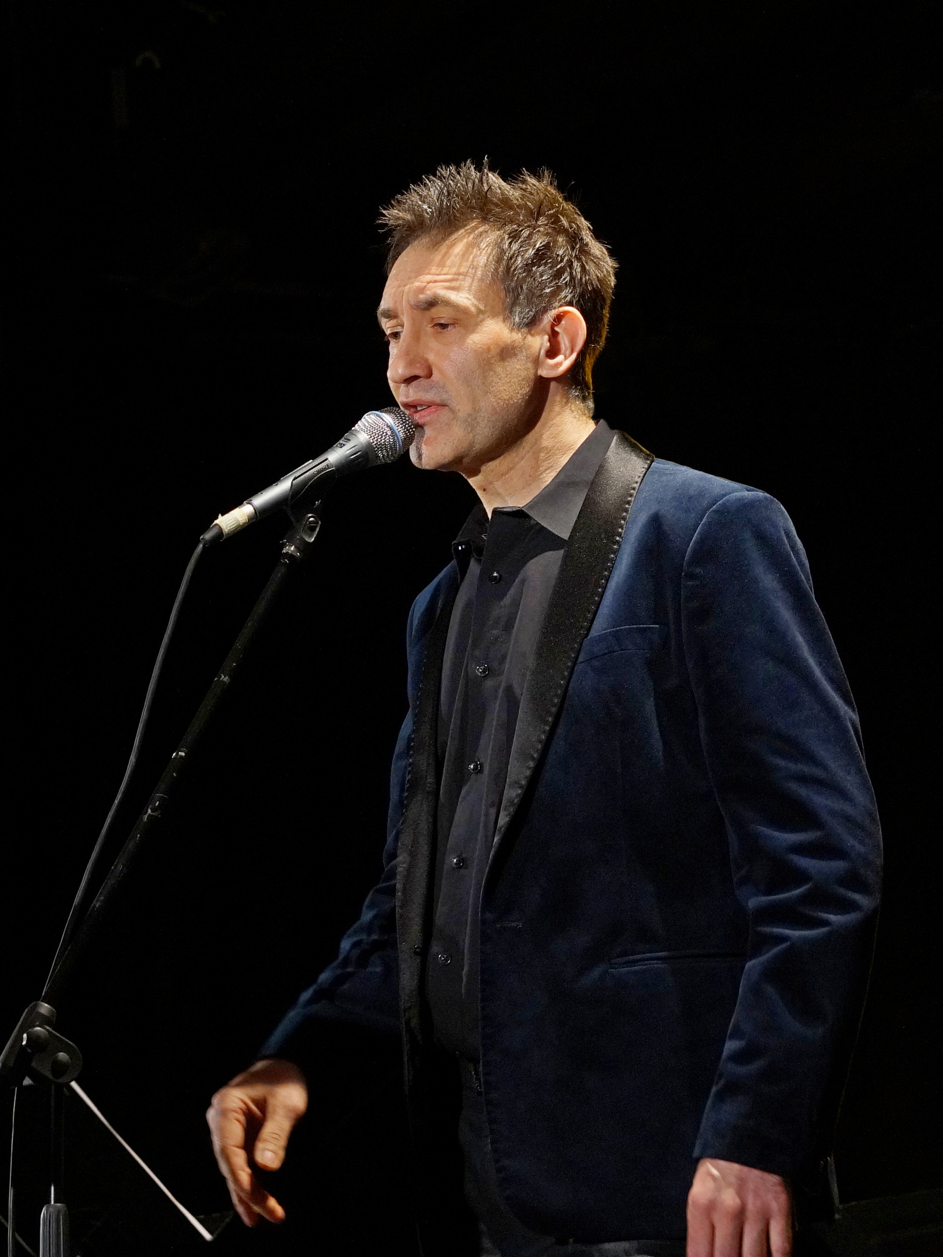 Janusz Szrom podczas koncertu ŚWIĄTECZNA ŚMIETANKA ŁOWICKA – "Straszni Panowie Trzej", Warszawa, Centrum Łowicka 27 grudnia 2014.